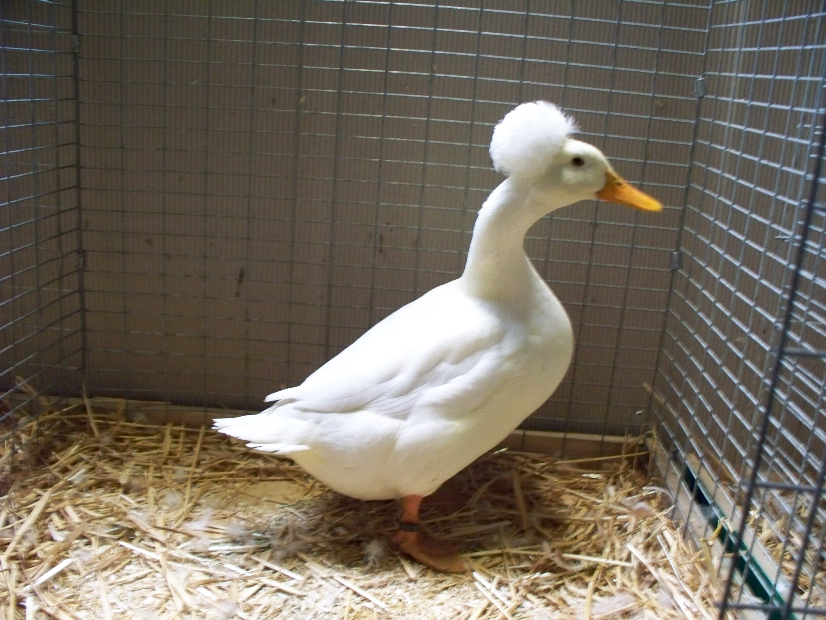 Landente